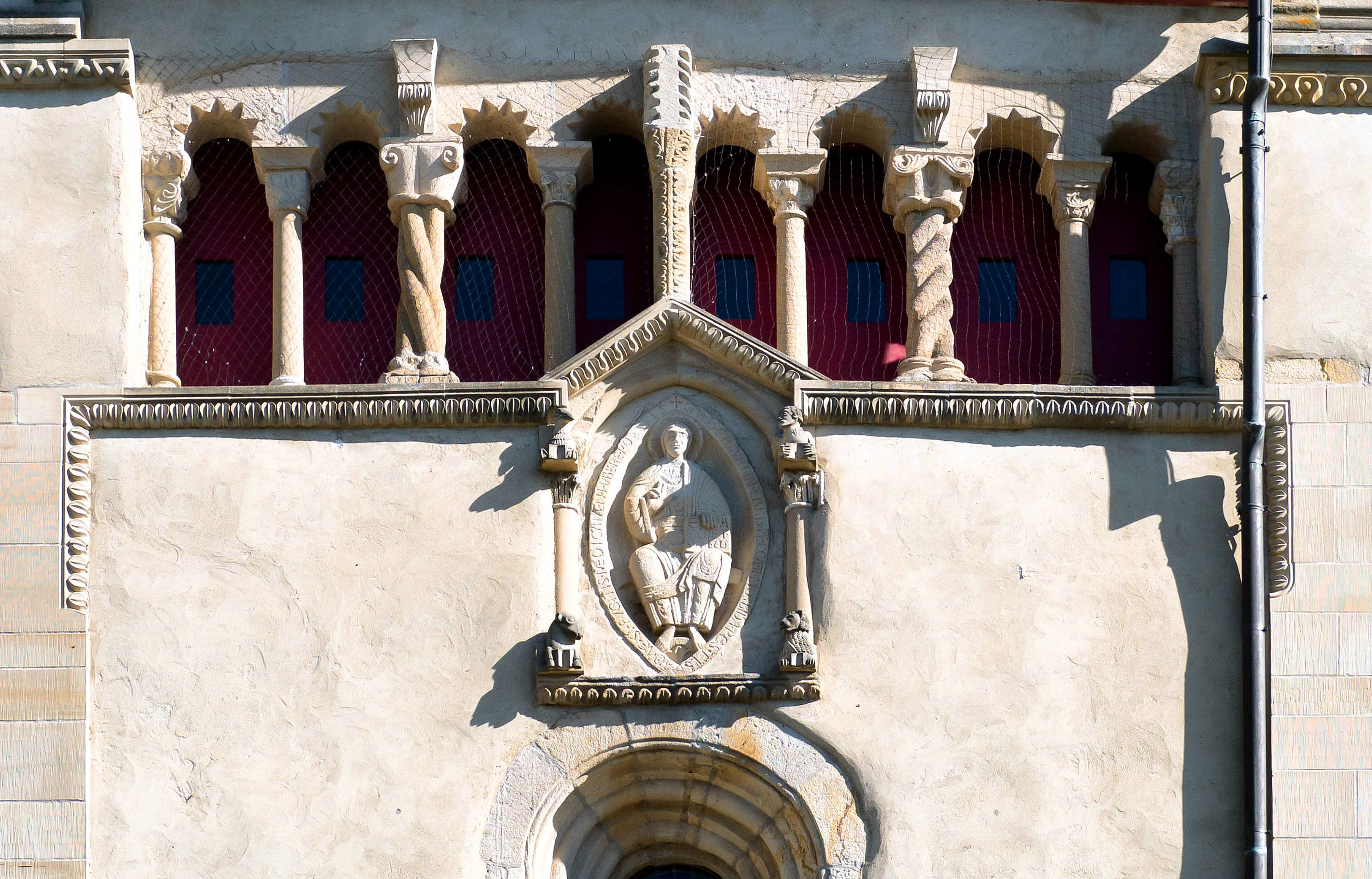 Wegen ihres Westbaus gehört die ehemalige Stiftskirche Ravengiersburg zu den bedeutendsten Bauwerken der Romanik im Mittelrheinraum. Über dem Mittelfenster Christus in der Mandorla (Majestas Domini), umgeben von den Symbolen der vier Evangelisten. Darüber Fensterarkaden mit kunstvoll gestalteten Kapitellen, Säulen und Friesen.